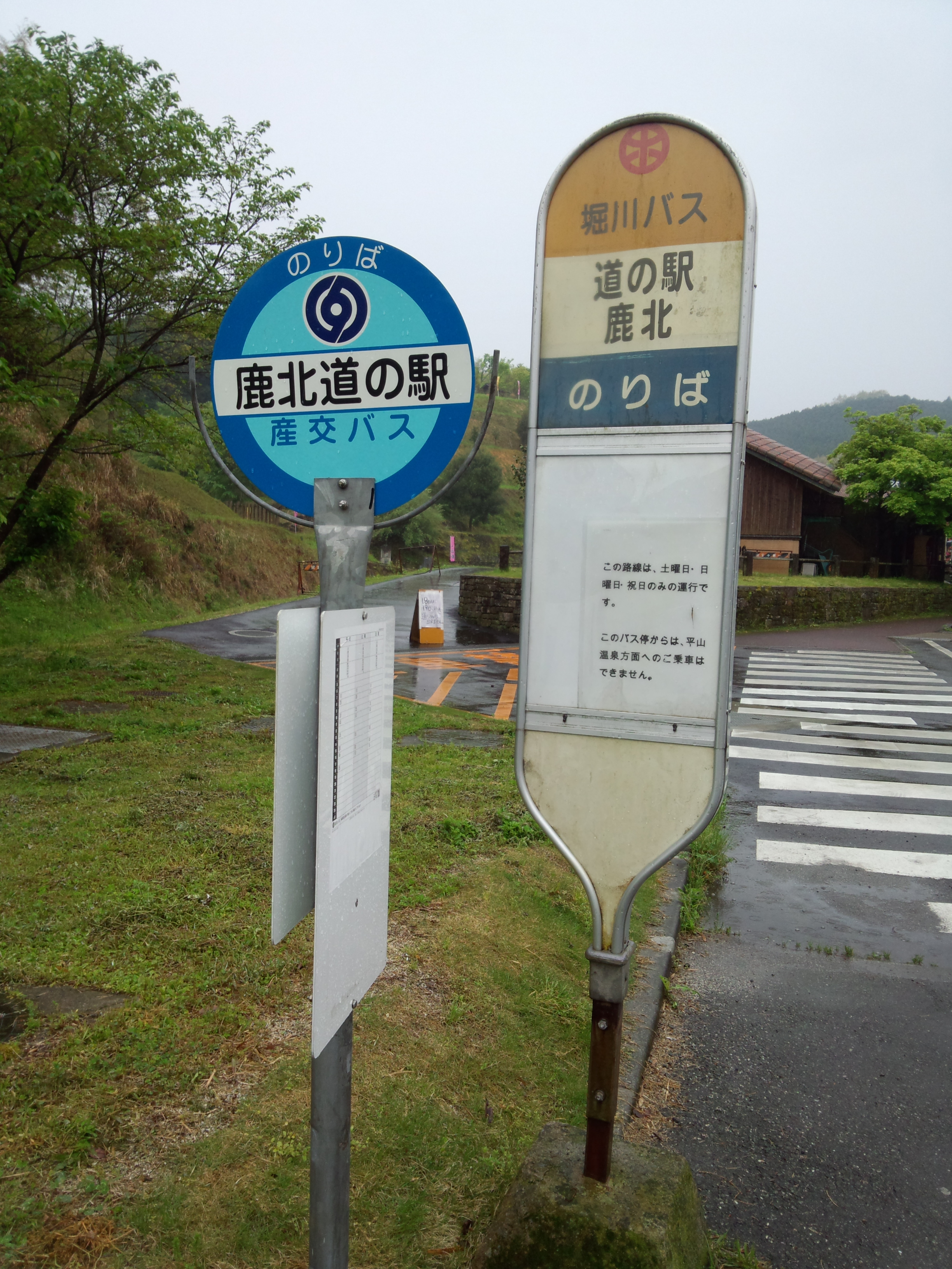 道の駅鹿北（熊本県山鹿市旧鹿北町）にあるバス停、左は九州産交グループで右は堀川バス